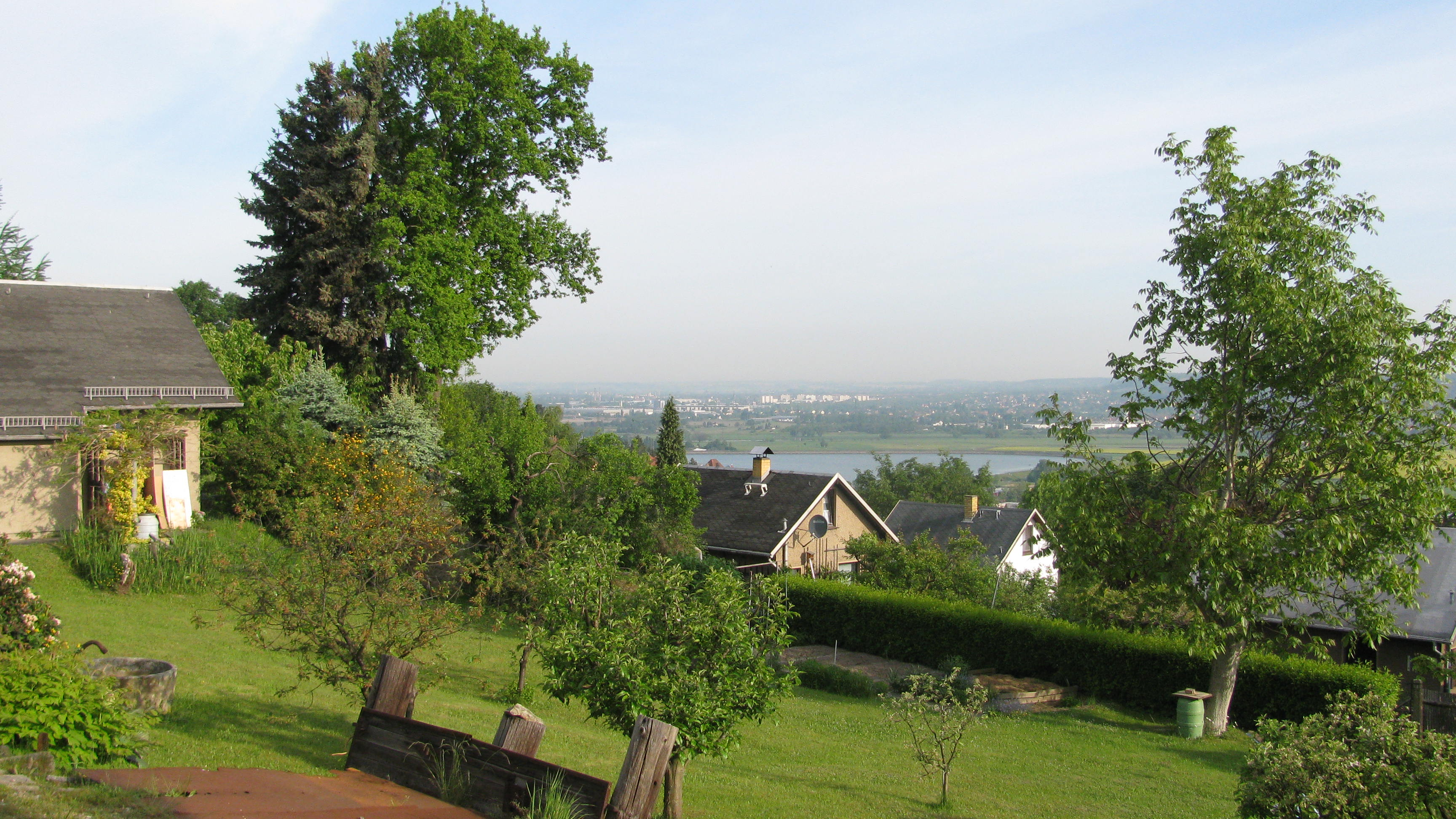 Wochenendhäuser in Neuleuteritz (Gemarkung und Ortschaft Cossebaude), Ortsteil von Dresden, mit Blick auf den Stausee Niederwartha und das Elbtal im Raum Coswig-Weinböhla